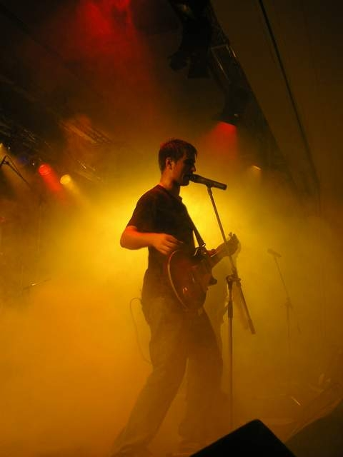 MCM Festival in der Bodenseeschule St. Martin, Friedrichshafen